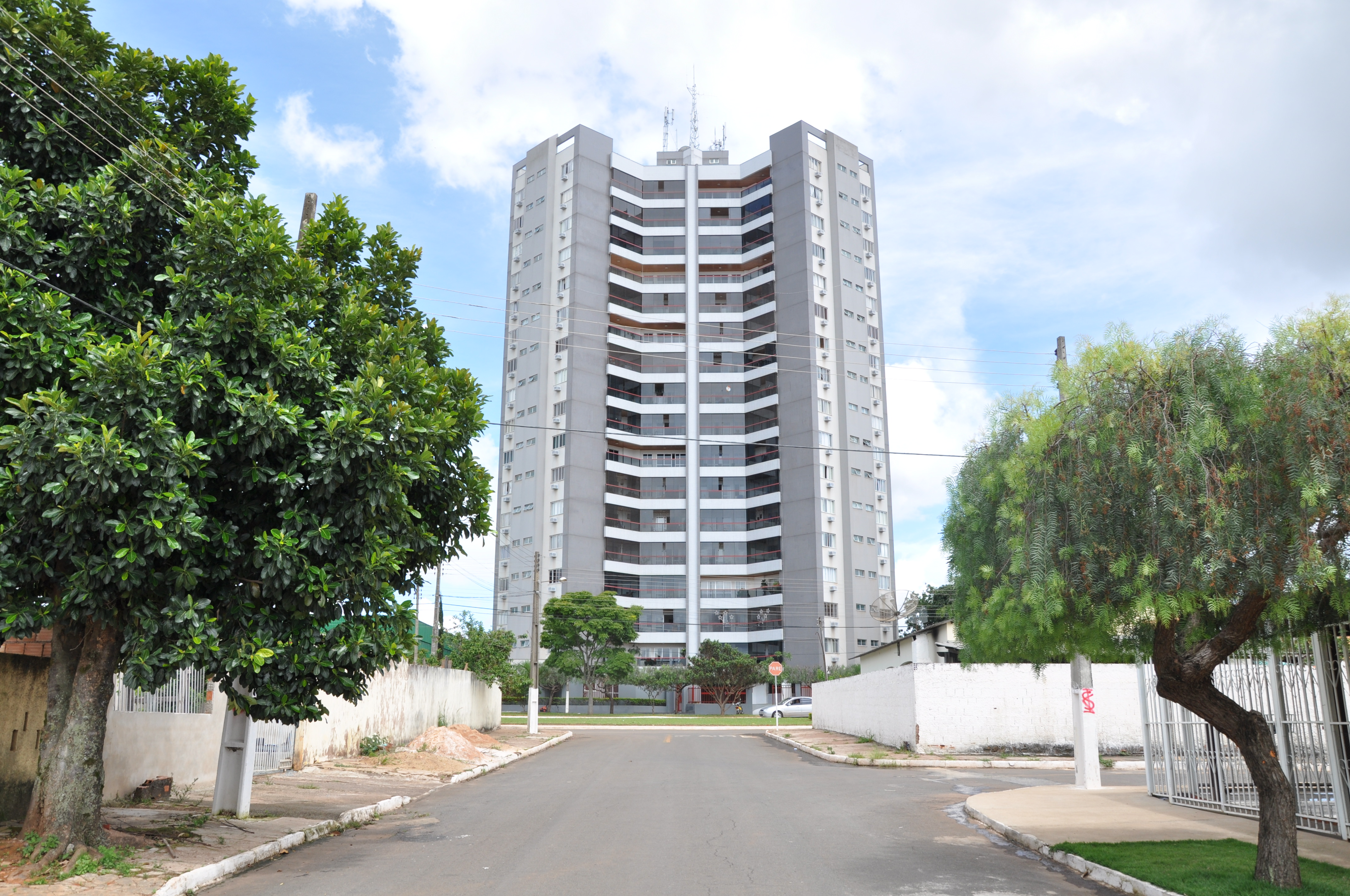 Foto do primeiro edifício com mais de 6 andares de Cristalina - GO.